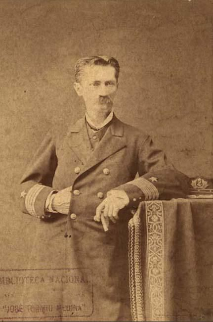 José Galvarino Riveros Cárdenas (Valdivia, Chile,[1] 2 de diciembre de 1829 – † Santiago de Chile, 11 de enero de 1892) fue un marino chileno, comandante de la escuadra chilena durante la Guerra del Pacífico.